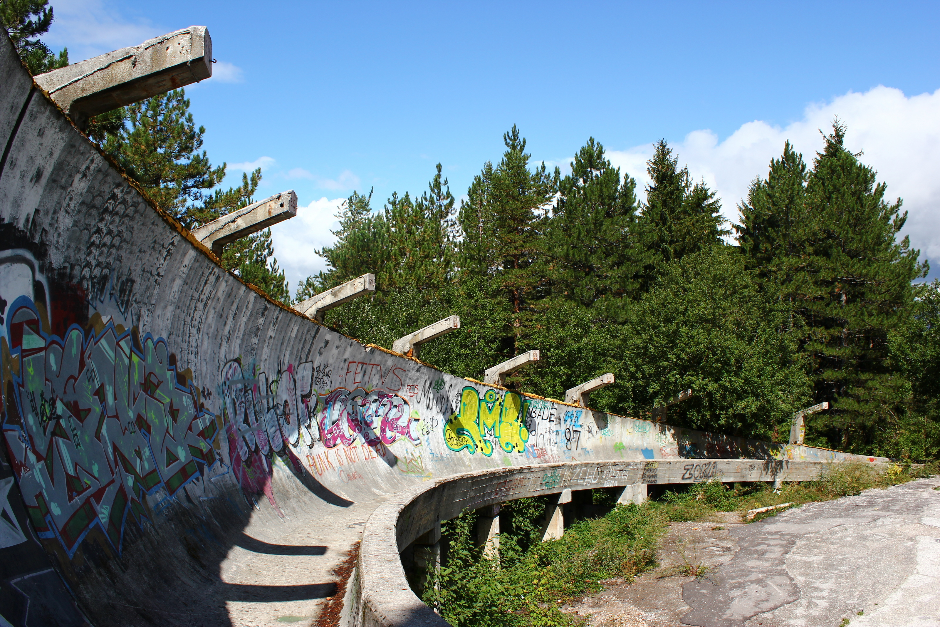 Die verfallene Bobbahn der Olympischen Winterspiele von 1984 am Hang des Trebević oberhalb von Sarajevo. Die Bahn verläuft durch verminte Wälder und ist seit dem Bosnienkrieg ungenutzt.